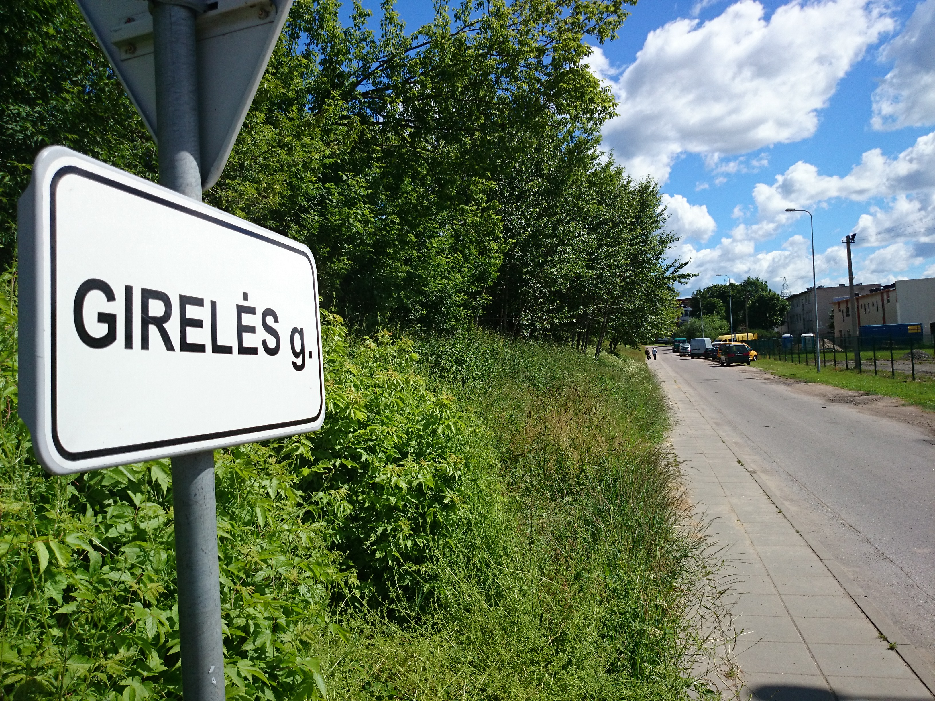 Girelė